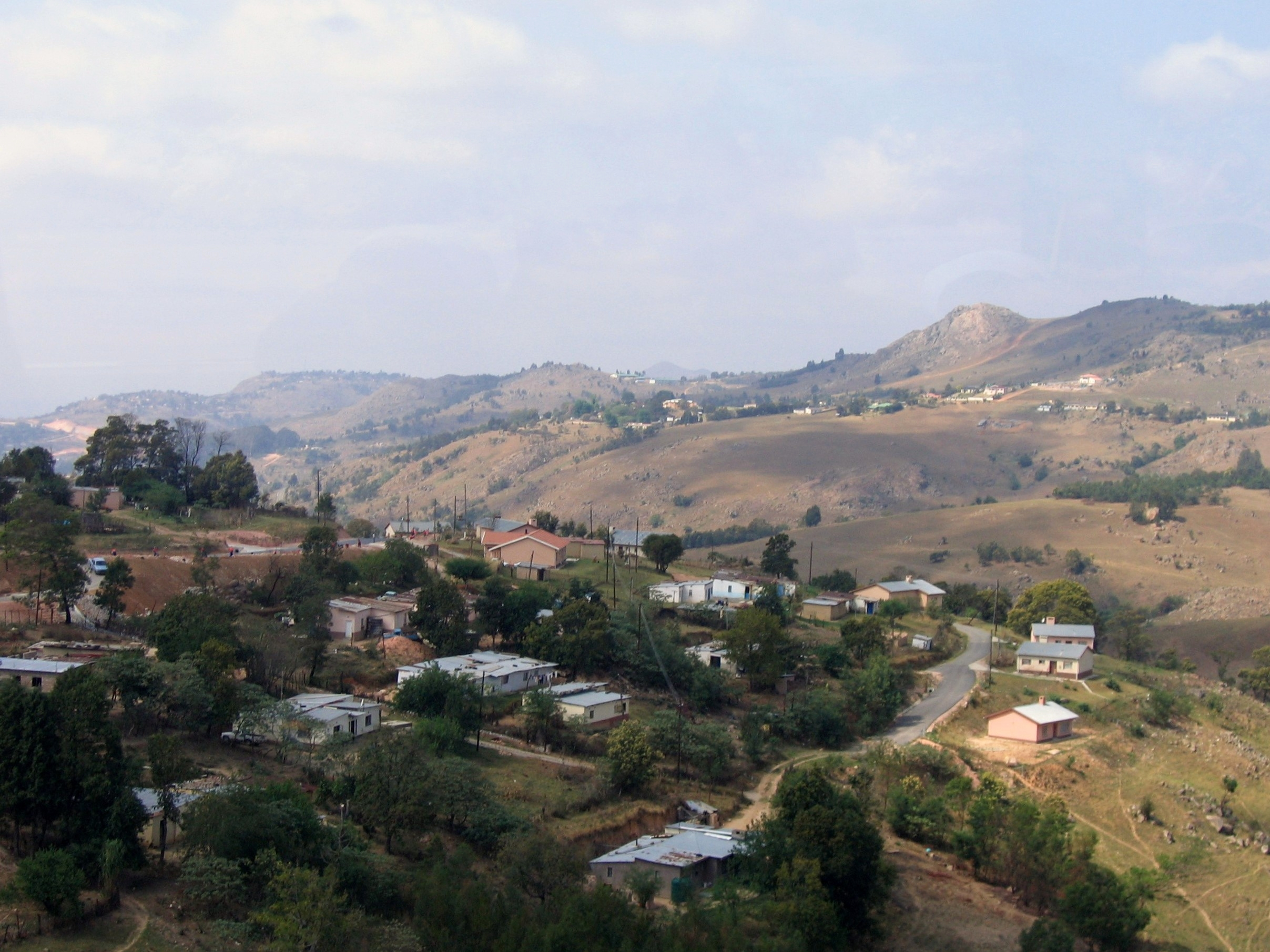 Mantenga Swaziland